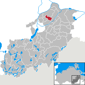 Staven in Mecklenburg-Vorpommern, Landkreis Mecklenburg-Strelitz